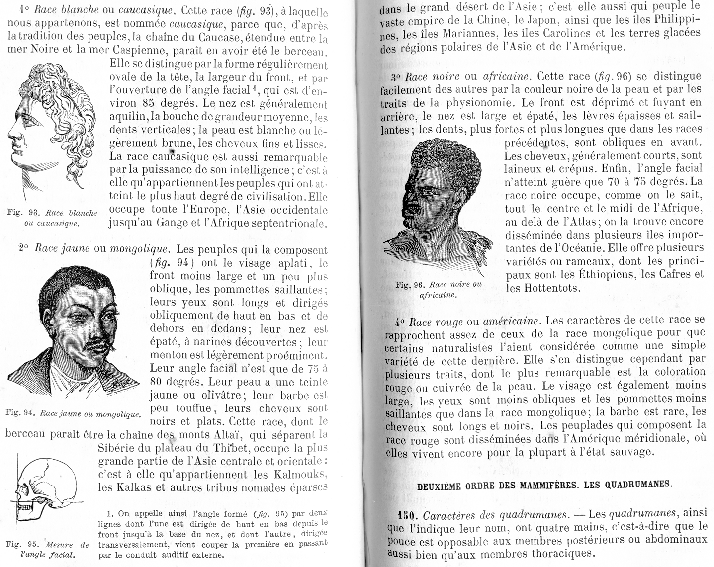 races humaines dans un manuel d'histoire naturelle de 1885.